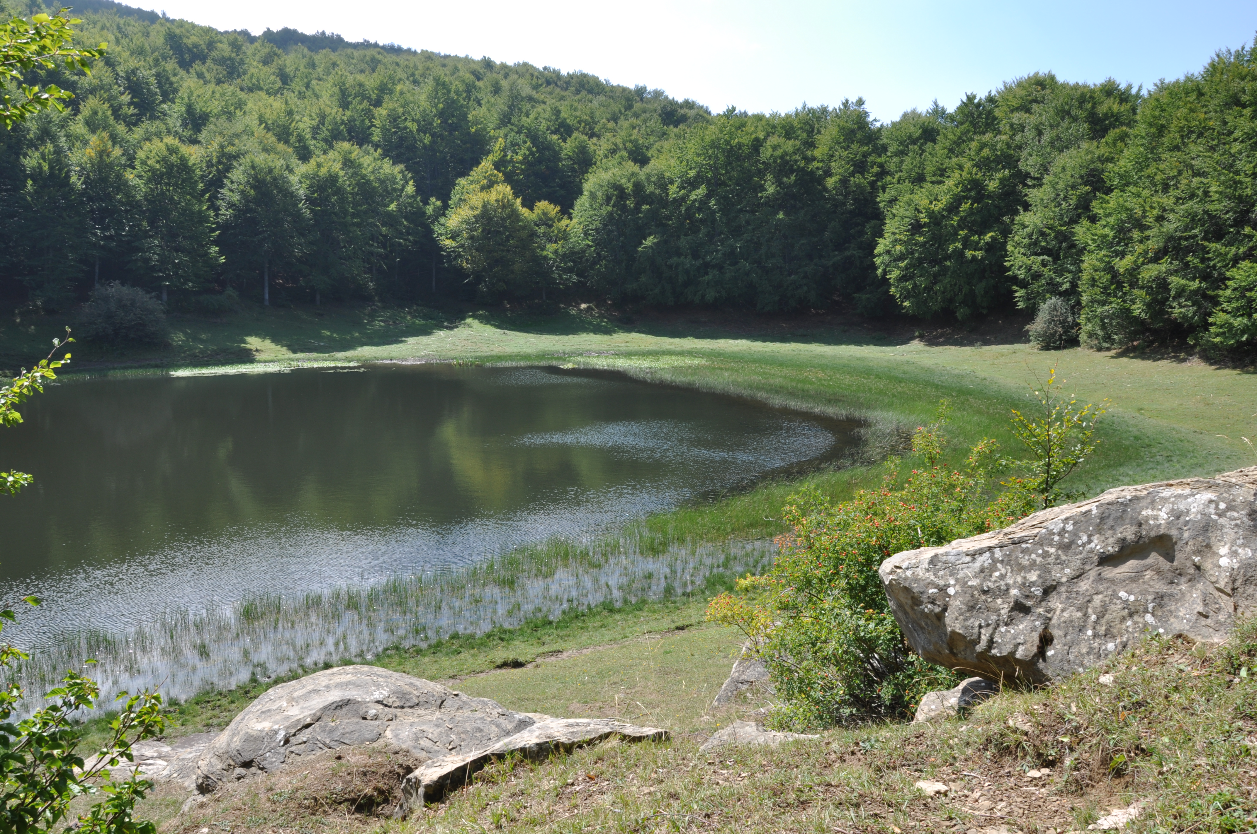 Oasi WWF Lago Secco - Comune di Accumoli - Provincia di Rieti - Italia This is a photo of a monument which is part of cultural heritage of Italy. The authorisation for taking photos of this object was provided by the World Wide Fund for Nature Italy.